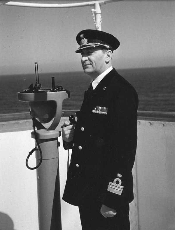 Il comandante superiore Piero Calamai sull'aletta del transatlantico Andrea Doria